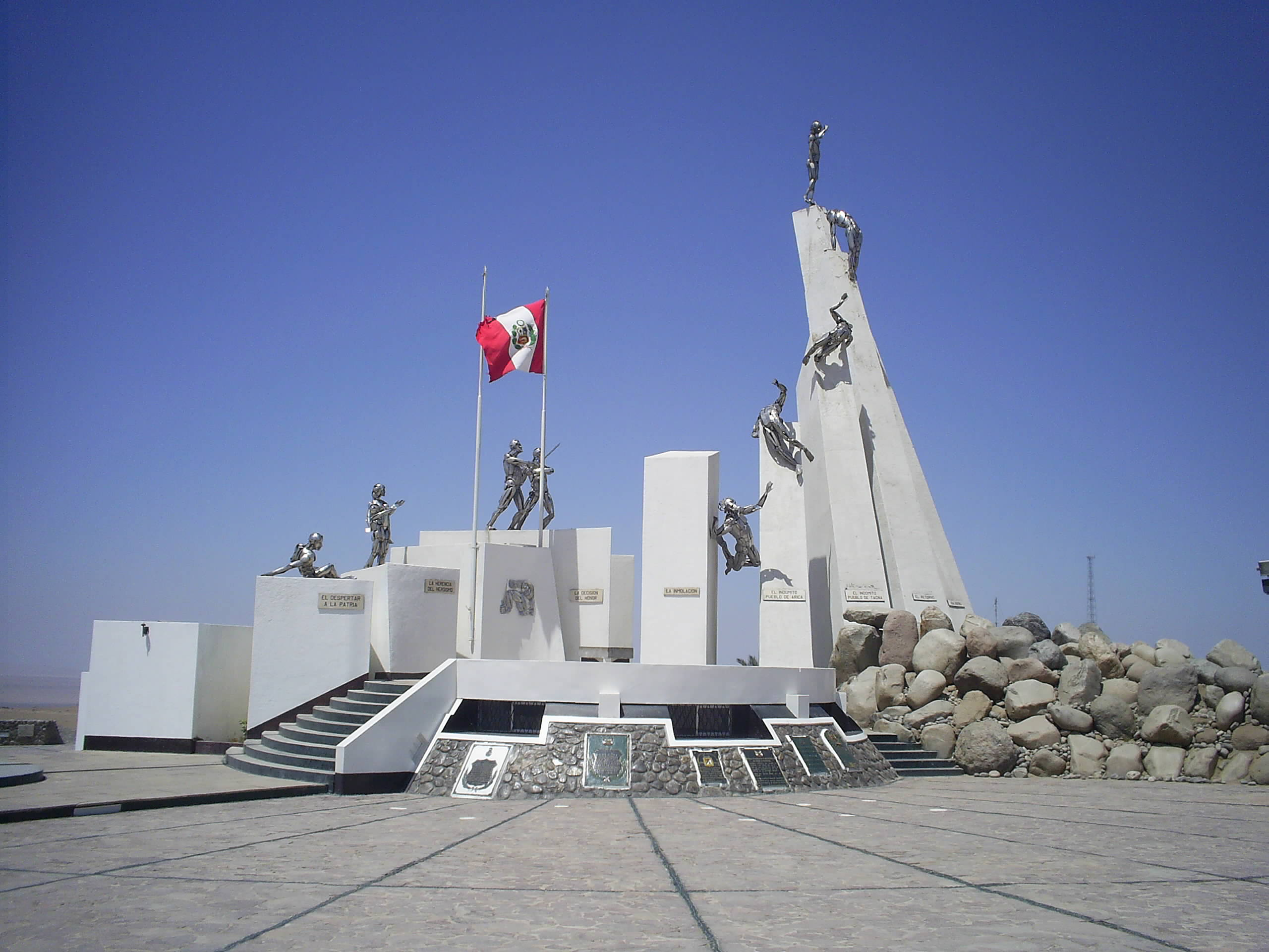 Pampas del cerro Intiorko. Monumento del Alto de la Alianza